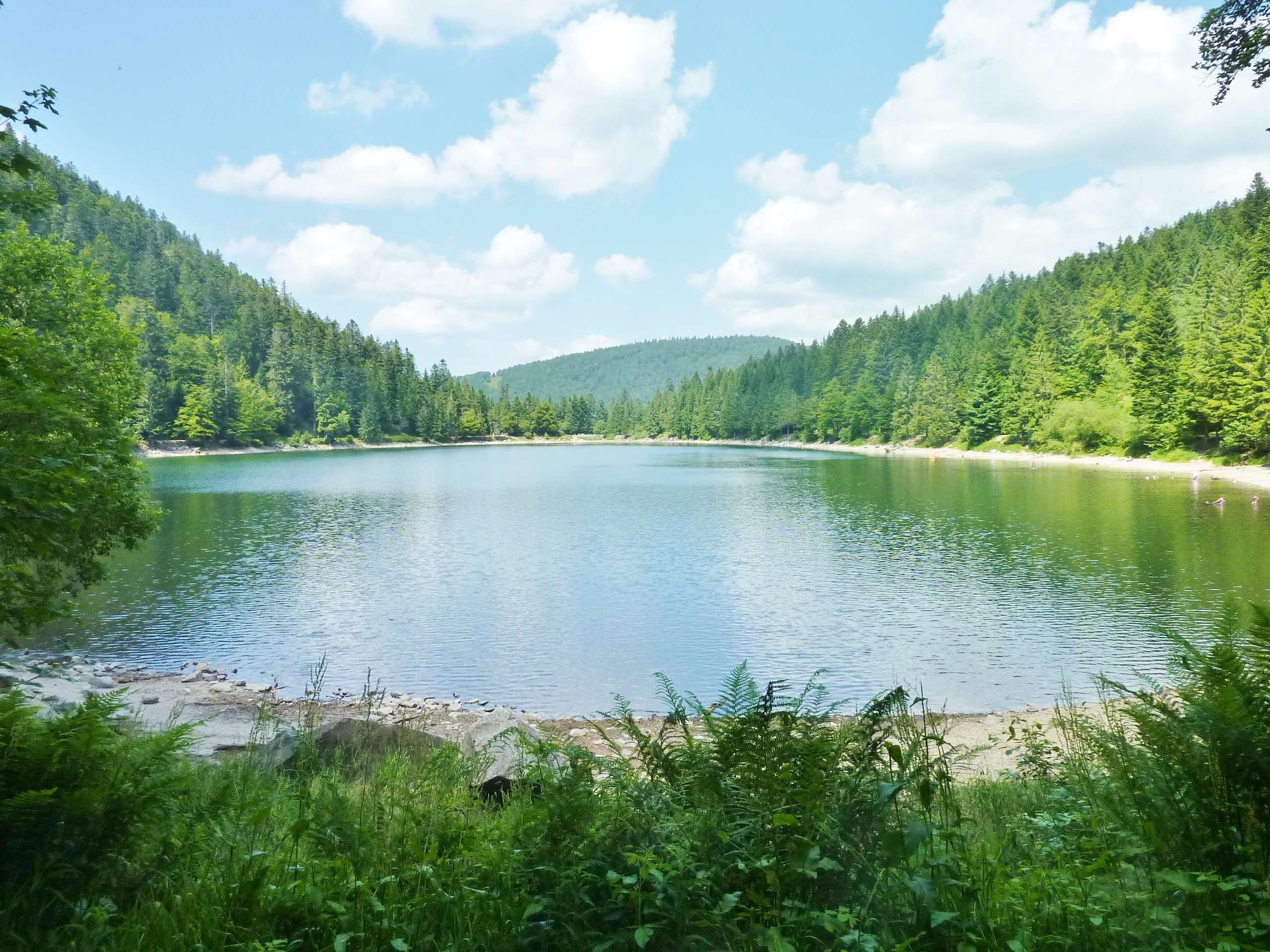 Lac des Corbeaux - Vue sur la vallée de Vologne et la montagne des Champis